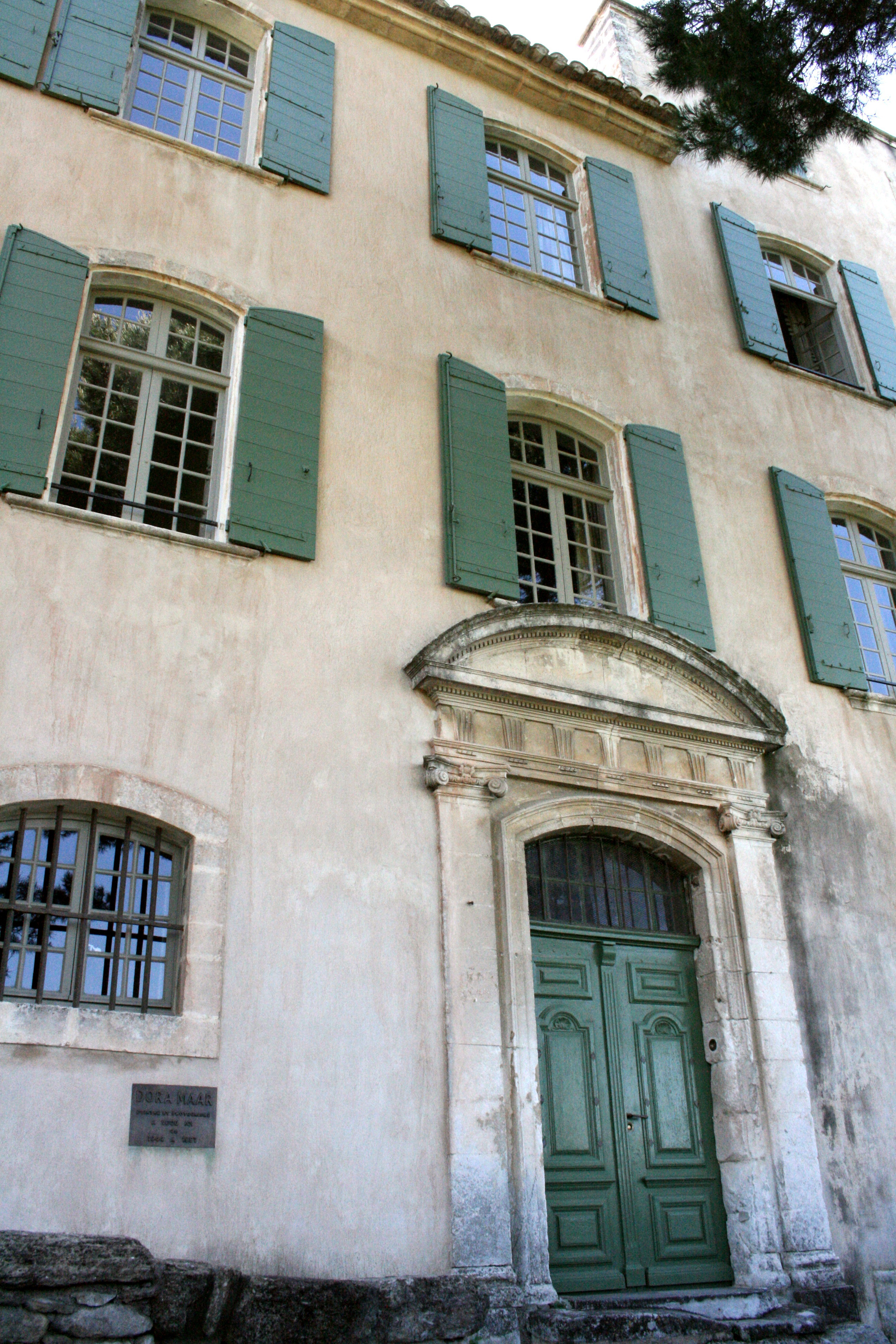 Maison de Dora Maar à Ménerbes, département du Vaucluse (France)